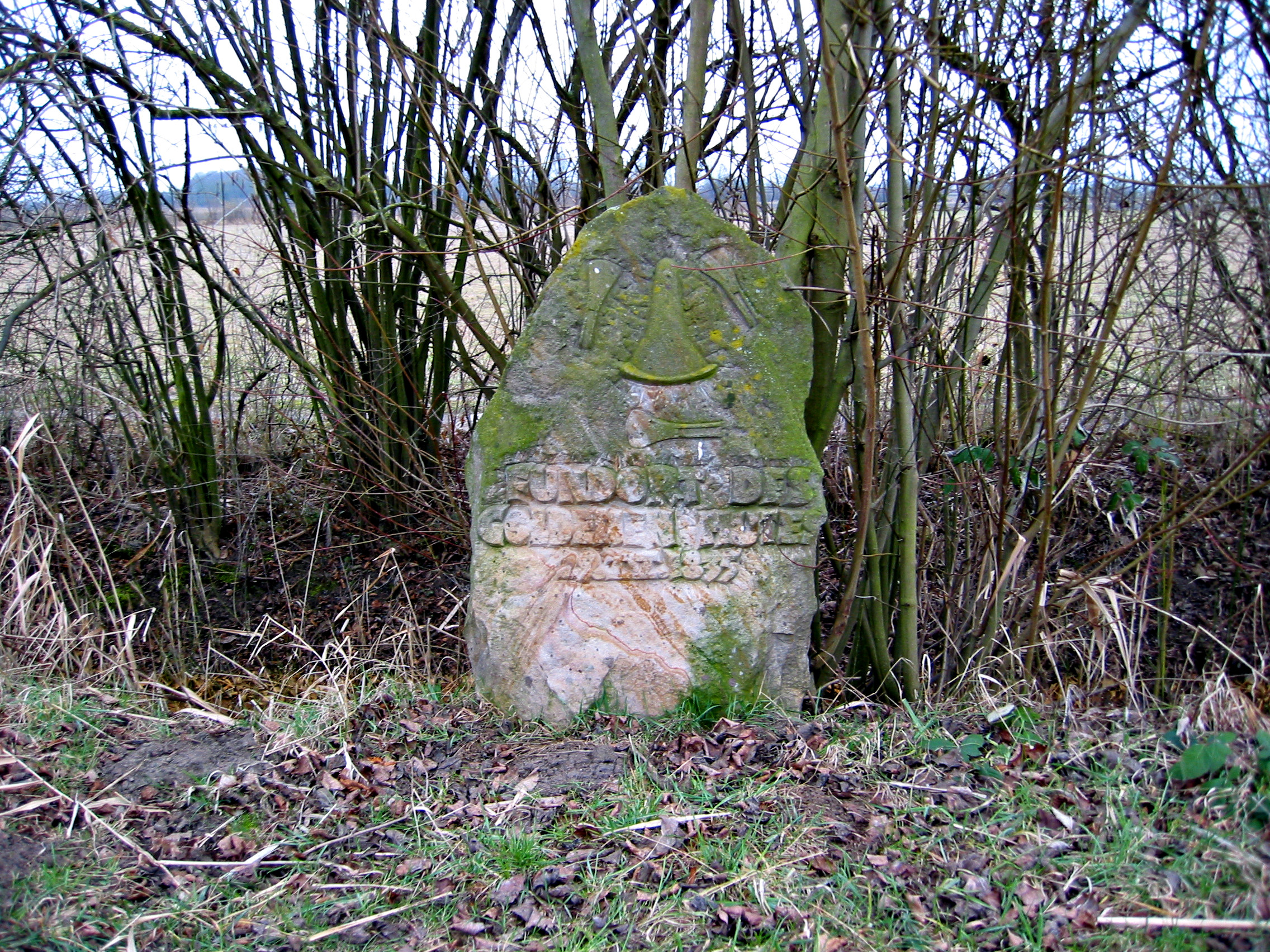 Denkmal Goldener Hut Schifferstadt